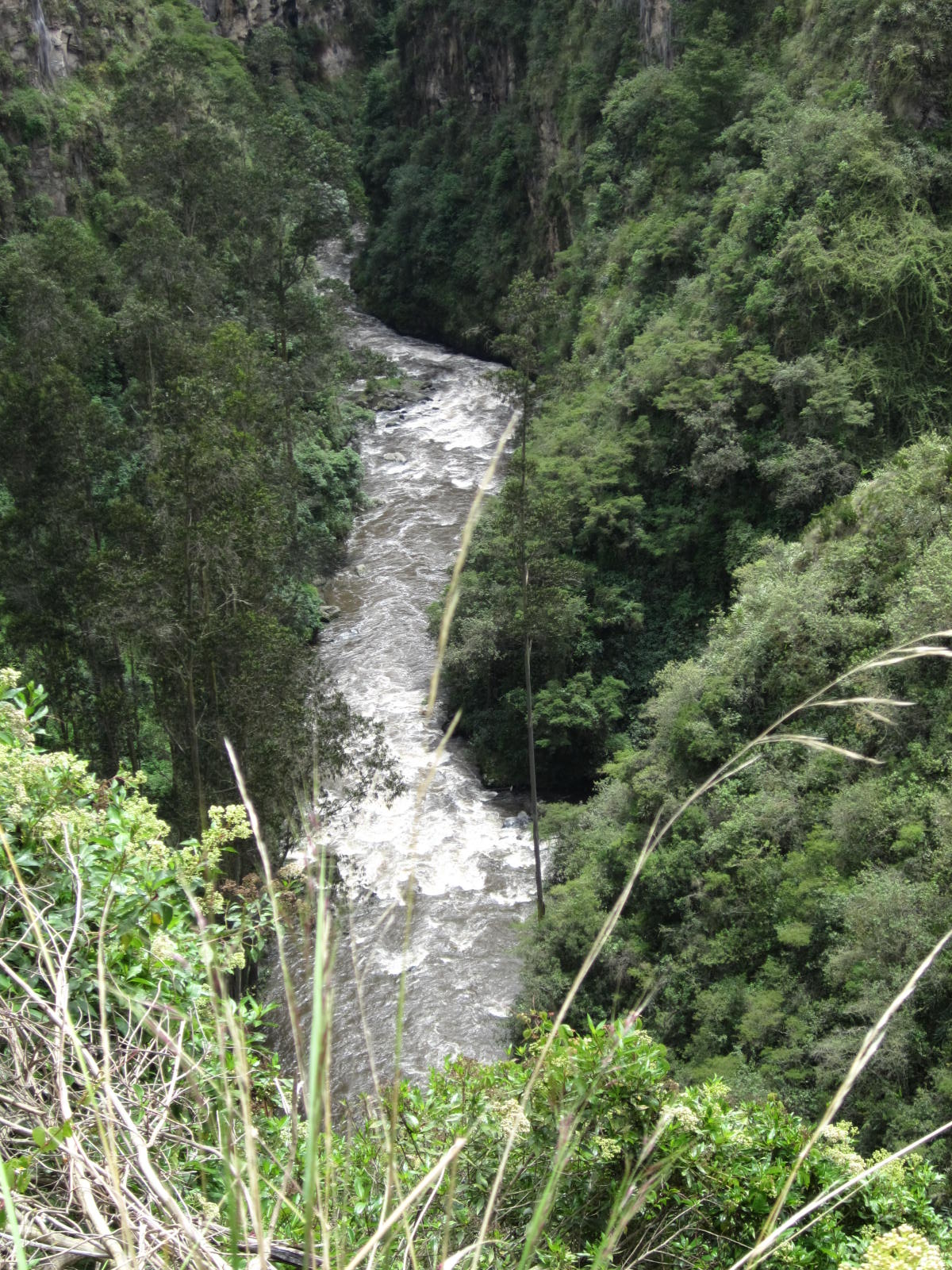 Río Guáytara, sector Las Lajas (Nariño-Colombia), en los abismos donde se encuentra el santuario más bello del mundo.